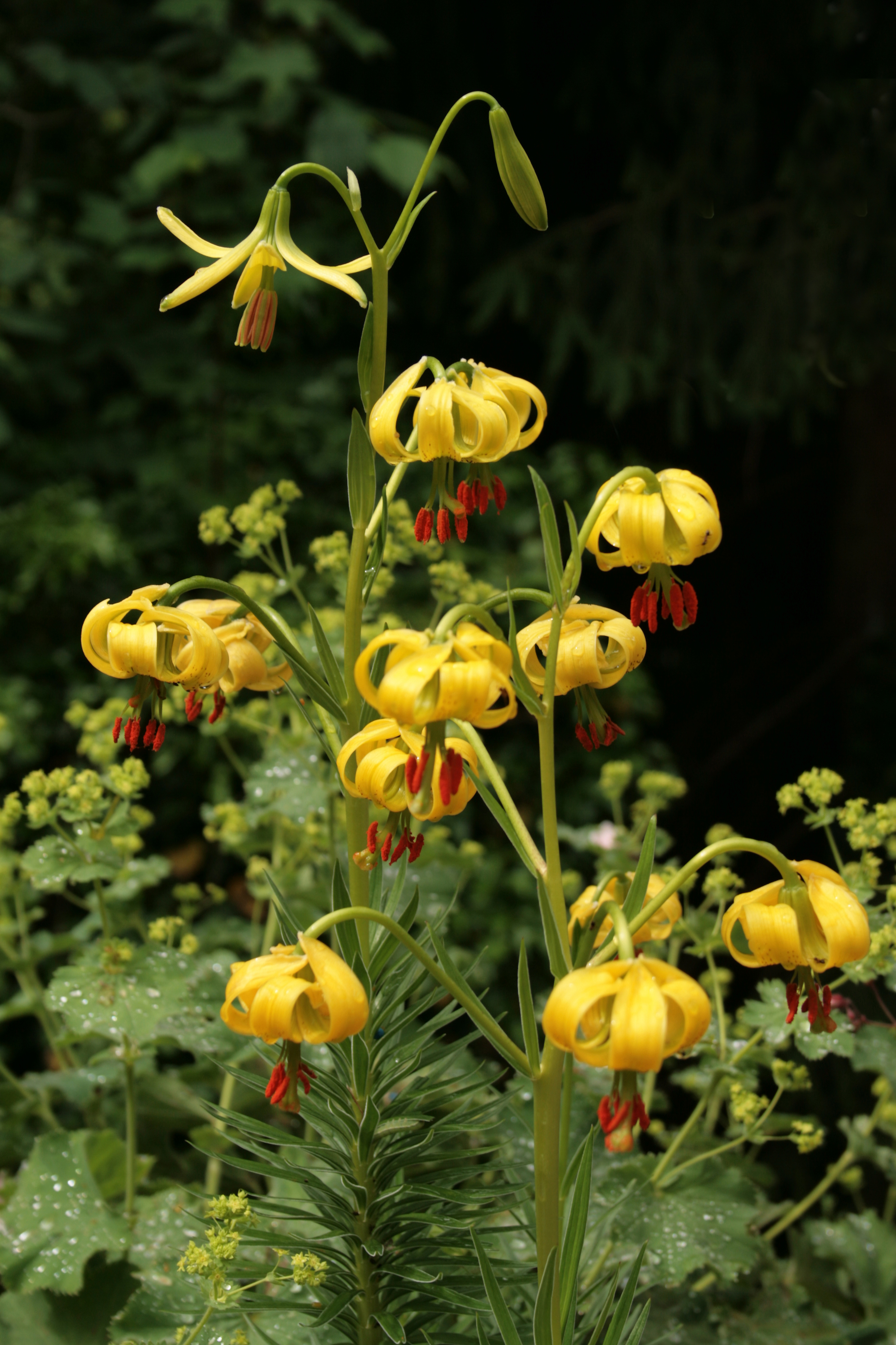 Lilium pyrenaicum